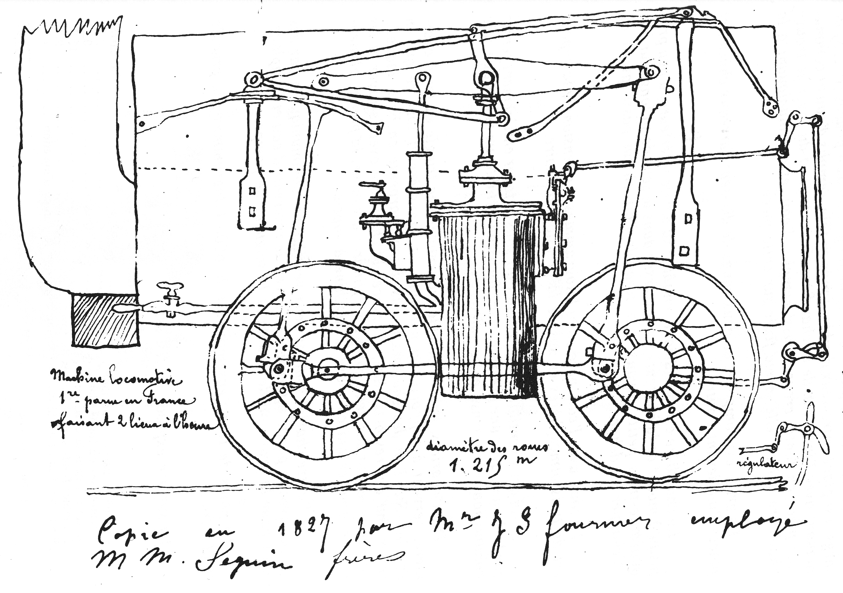 Croquis de locomotive Stephenson livrée en 1828.